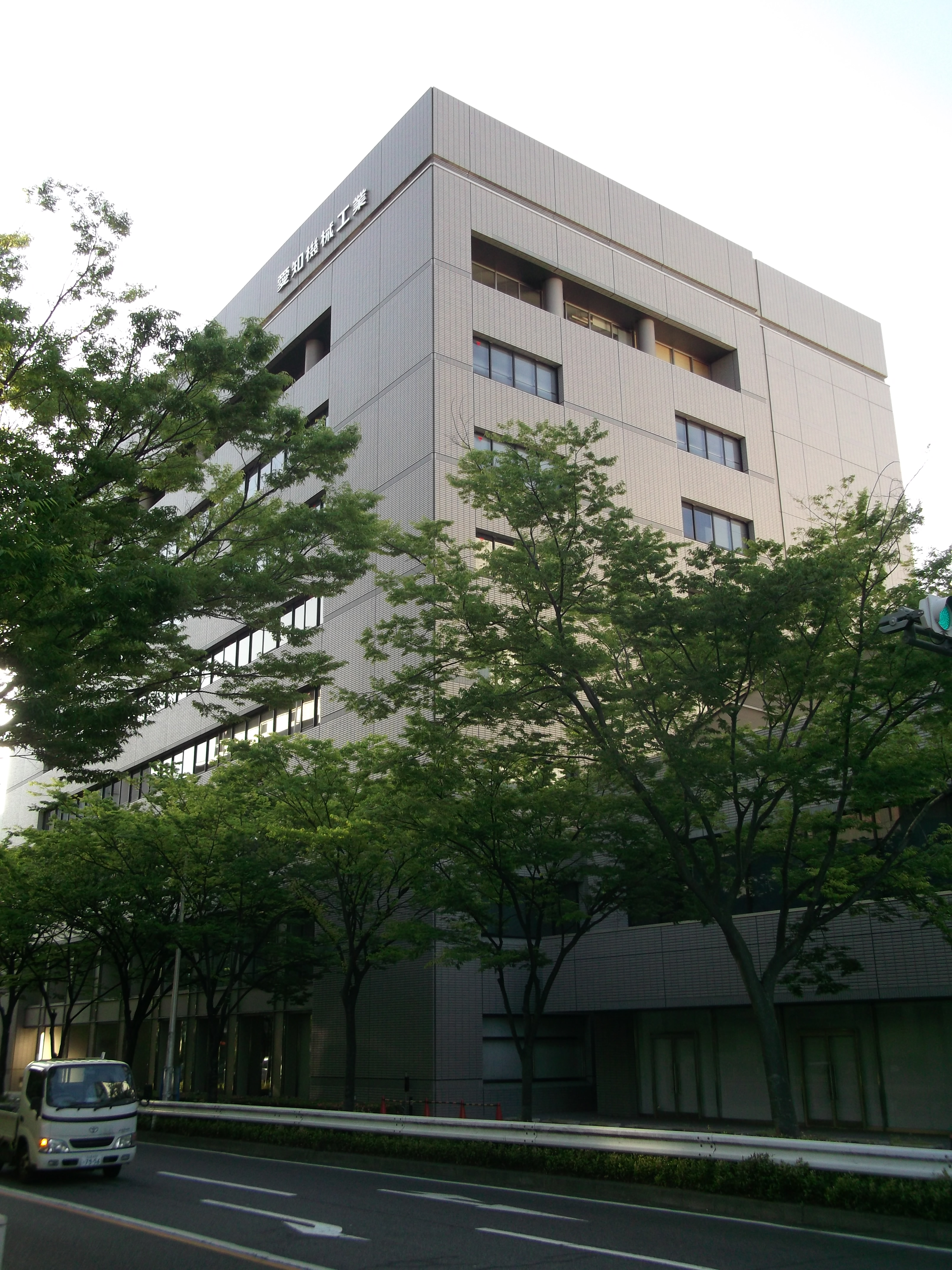 名古屋市熱田区の愛知機械工業を南側公道東側から写す